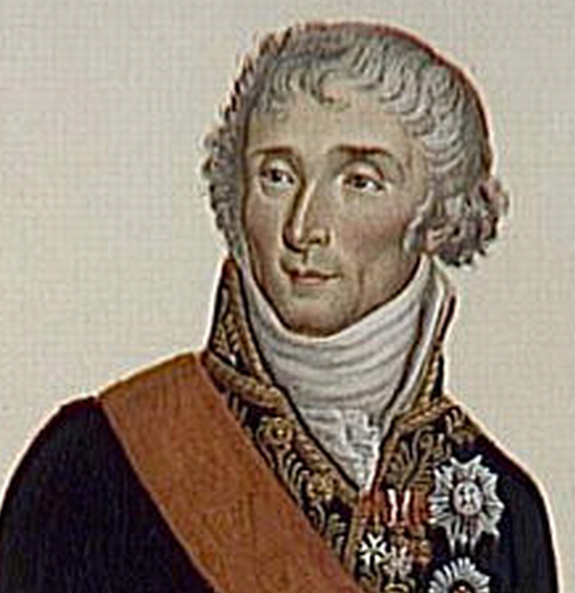 Joseph Fouché, duc d'Otrante.